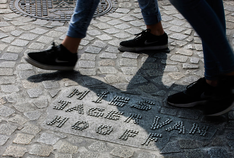 Naamsteen van slachtoffer Mies Jager-van Hooff. De 31 naamstenen voor de slachtoffers zijn 7 mei 2016 onthuld. Foto: Gert Jan van Rooij.